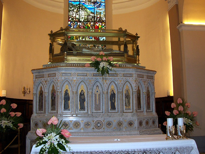 Gubbio - Urna con le spoglie di S. Ubaldo (nella Basilica di S. Ubaldo)